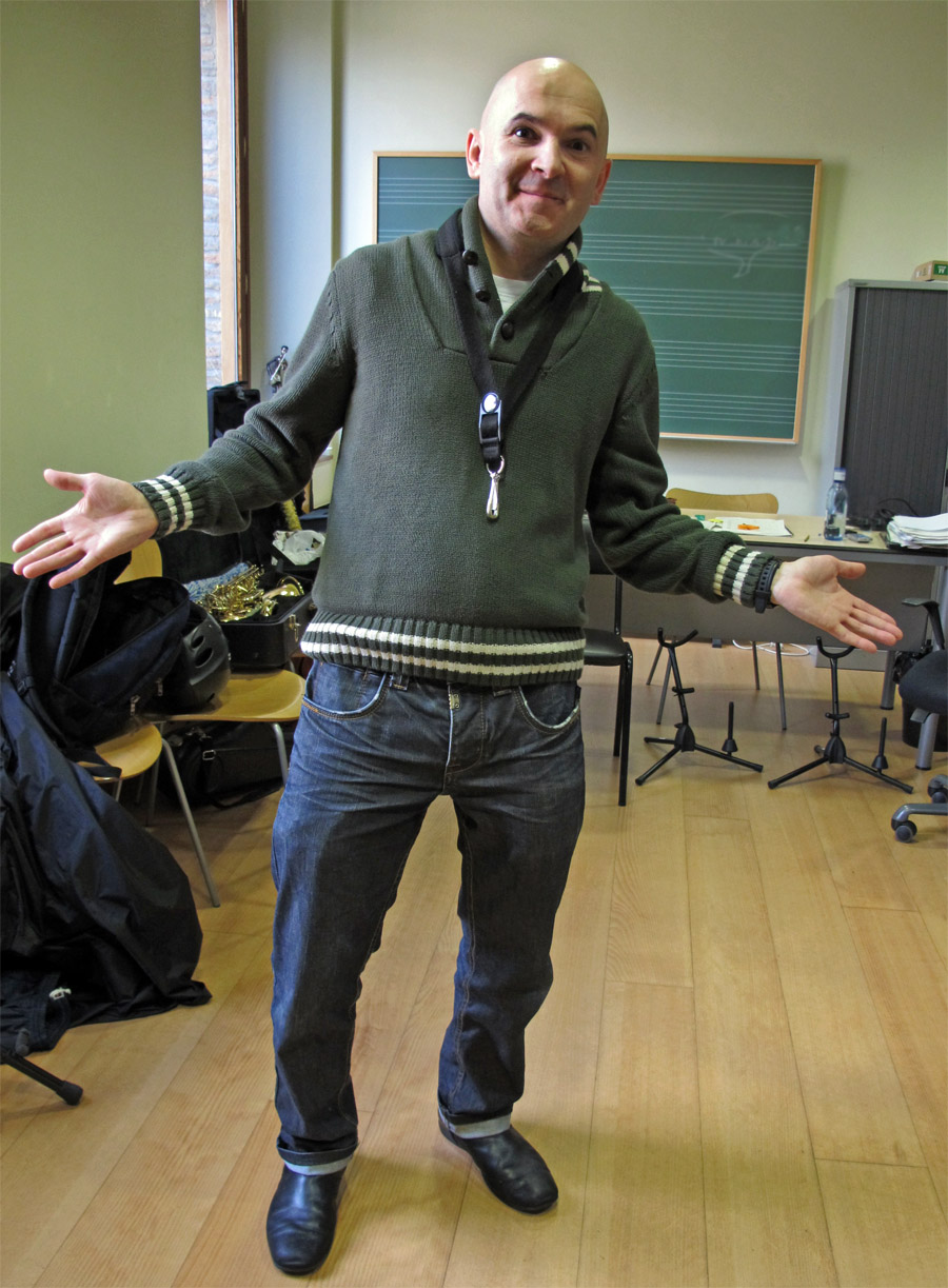 El saxofonista Raúl Romo en la Escuela de Música Luis Aramburu (Vitoria, España, 16 de enero de 2013)